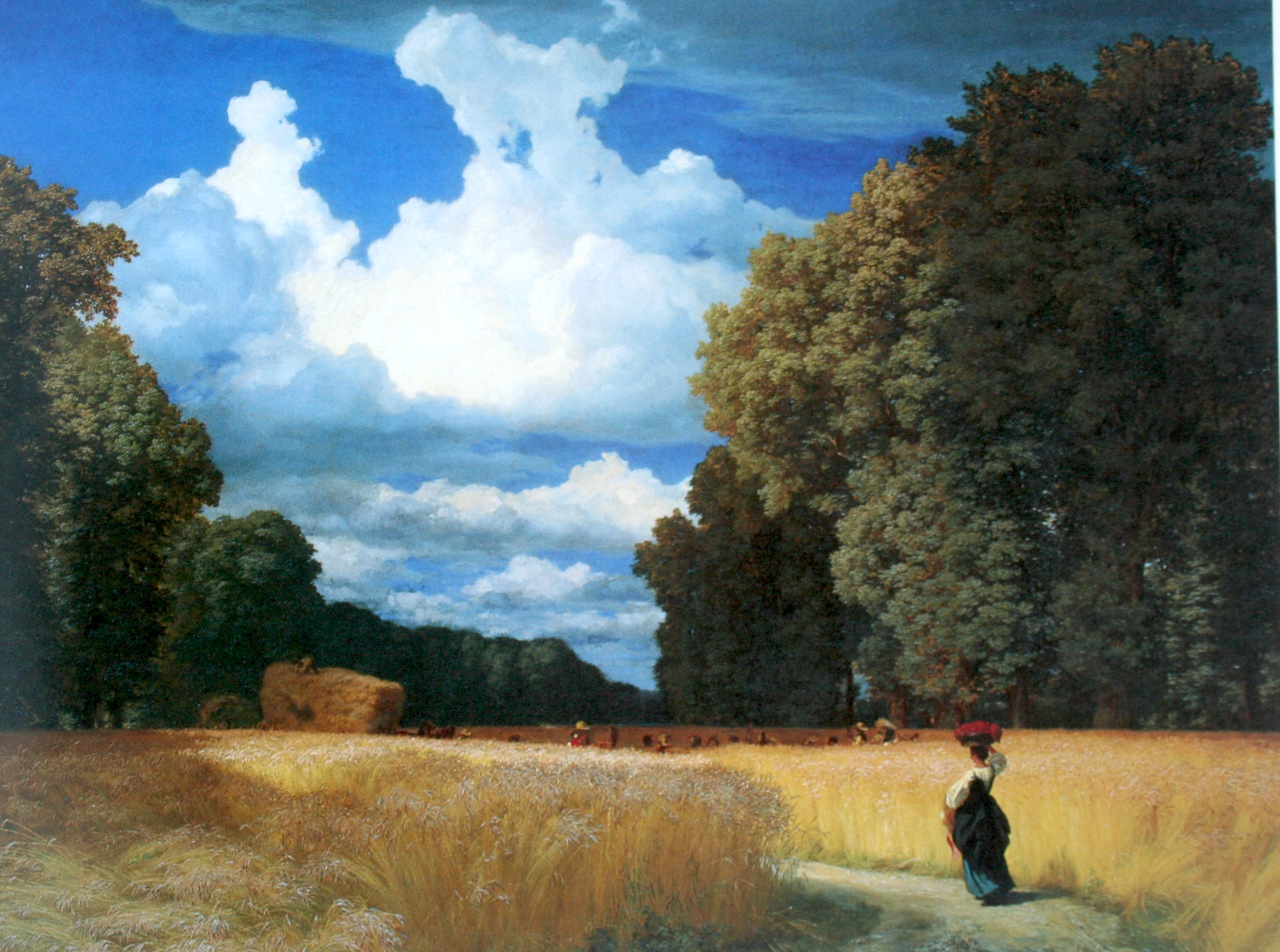 Gemälde von Robert Zünd aus dem Jahr 1860; Öffentliche Kunstsammlung Basel, Kunstmuseum